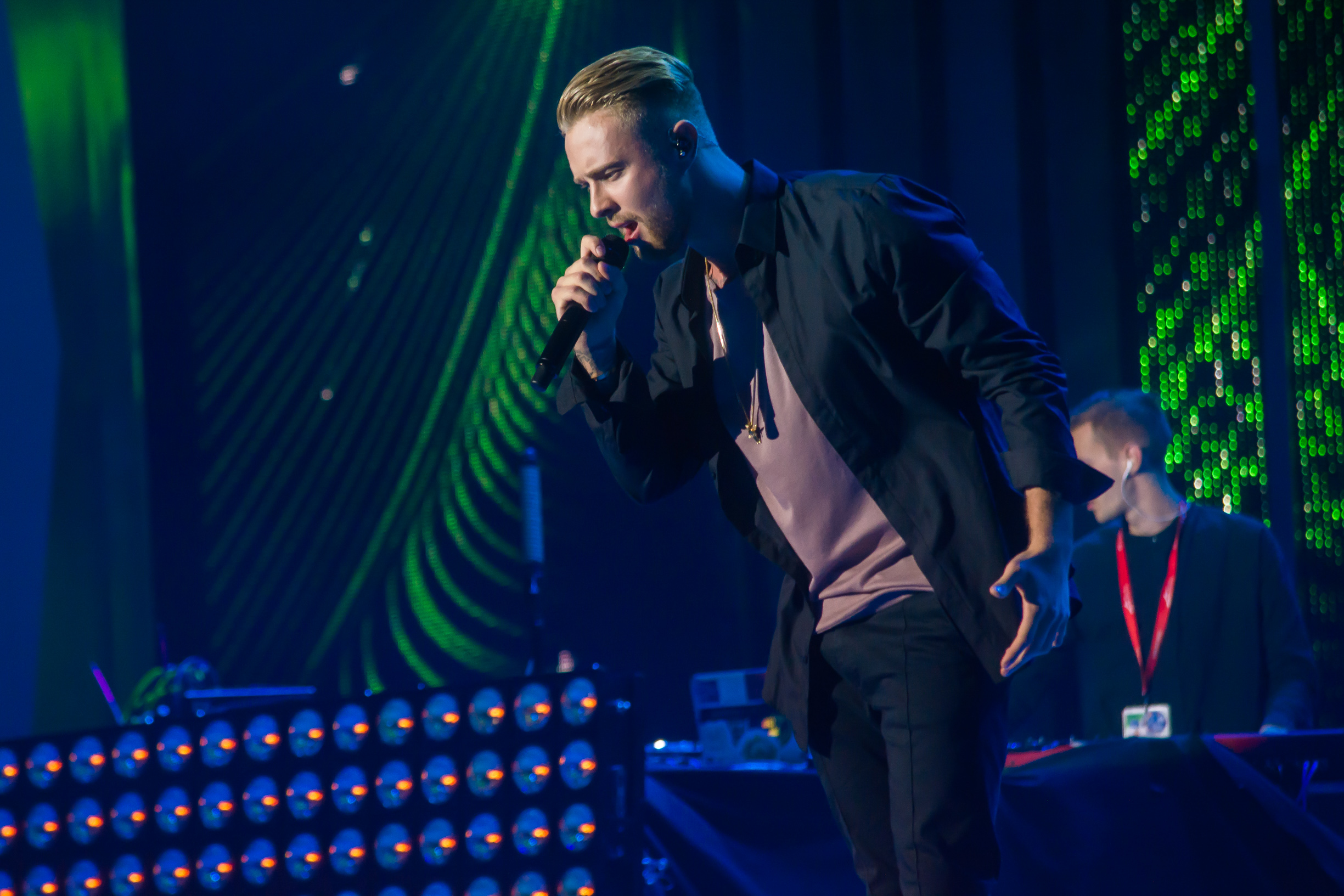 Егор Крид на Europa Plus TV. Hit Non Stop в Витебске 2016